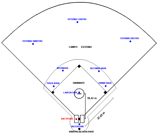 Categoria:Immagini di baseball